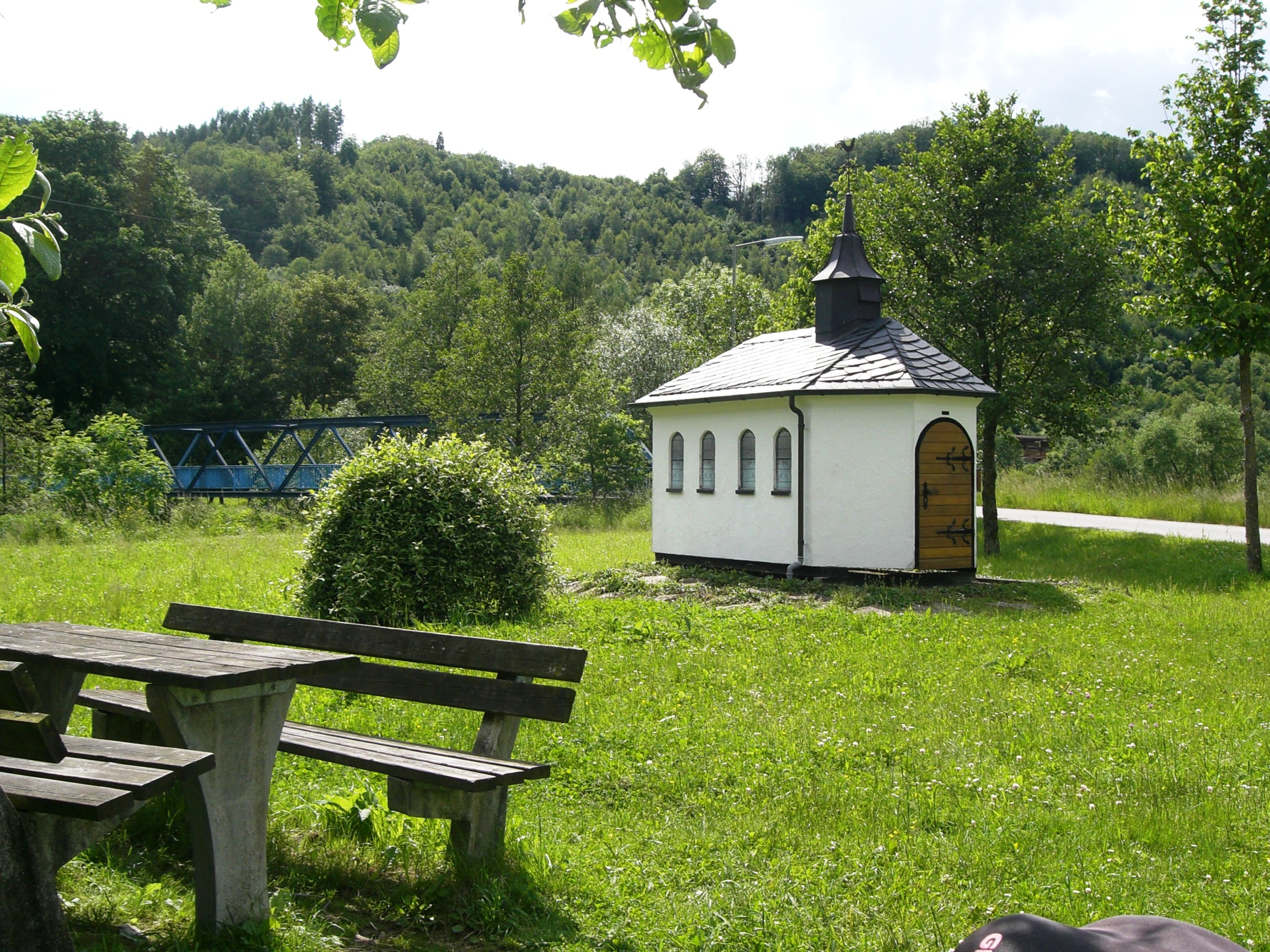 Ruhezone in Theten mit Bänken, Miniaturkapelle und Lennebrücke